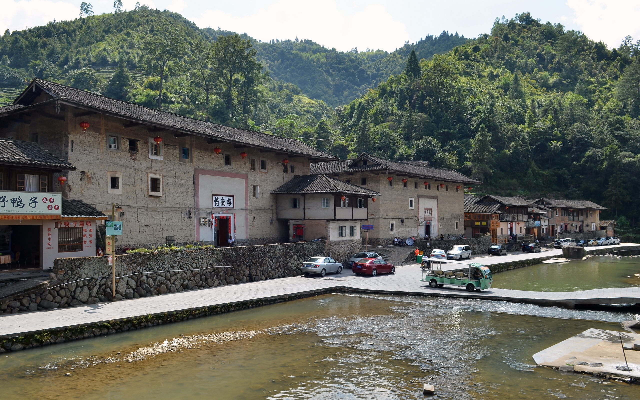 福建漳州南靖塔下村